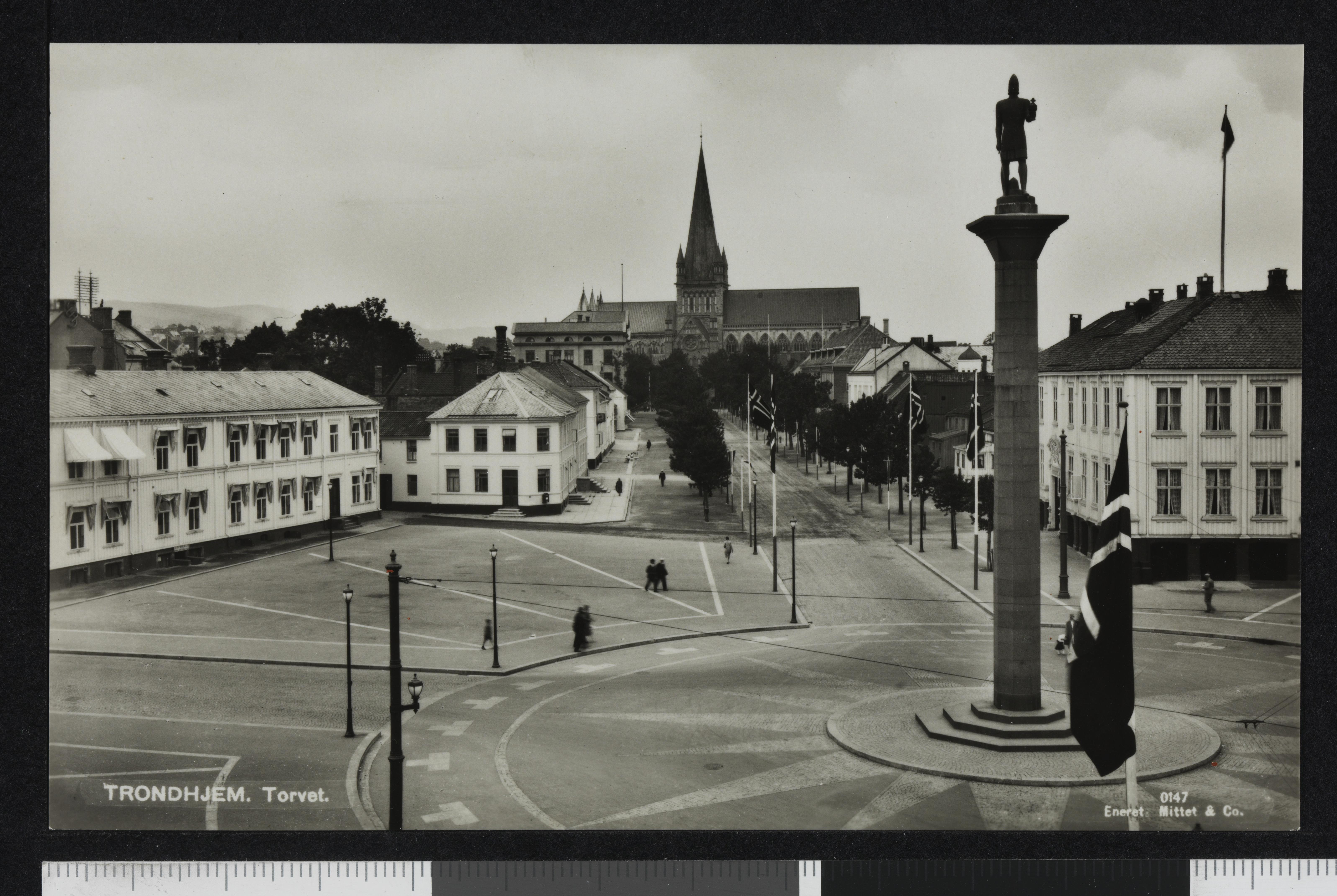 Bildet er hentet fra Nasjonalbibliotekets bildesamling Midtbyen,Torget, Trondheim, Sør Trøndelag